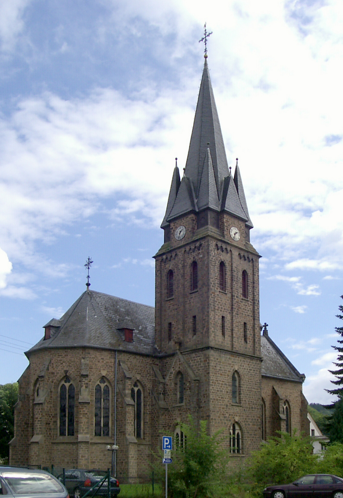 römisch-katholische Pfarrkirche St. Josef in Rosbach (Sieg); erbaut 1896-1898 nach Entwurf des Kölner Architekten Theodor Kremer; unter Denkmalschutz